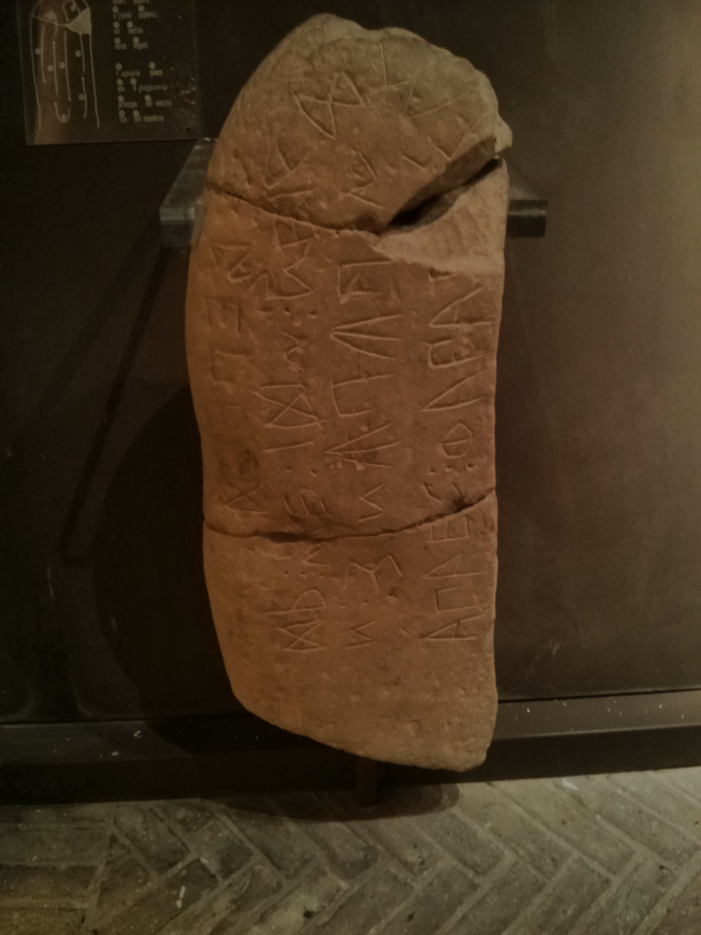 Iscrizioni picene - Stele di Loro Piceno Museo archeologico nazionale delle Marche Native nameMuseo archeologico nazionale delle MarcheLocationAncona, Marche, ItalyCoordinates43° 37′ 23.39″ N, 13° 30′ 39.38″ E Established1863 Web page control : Q3867709 VIAF: 130879044 ISNI: 0000 0001 2158 0954 LCCN: nr97041772 SUDOC: 027703002 WorldCat institution QS:P195,Q3867709